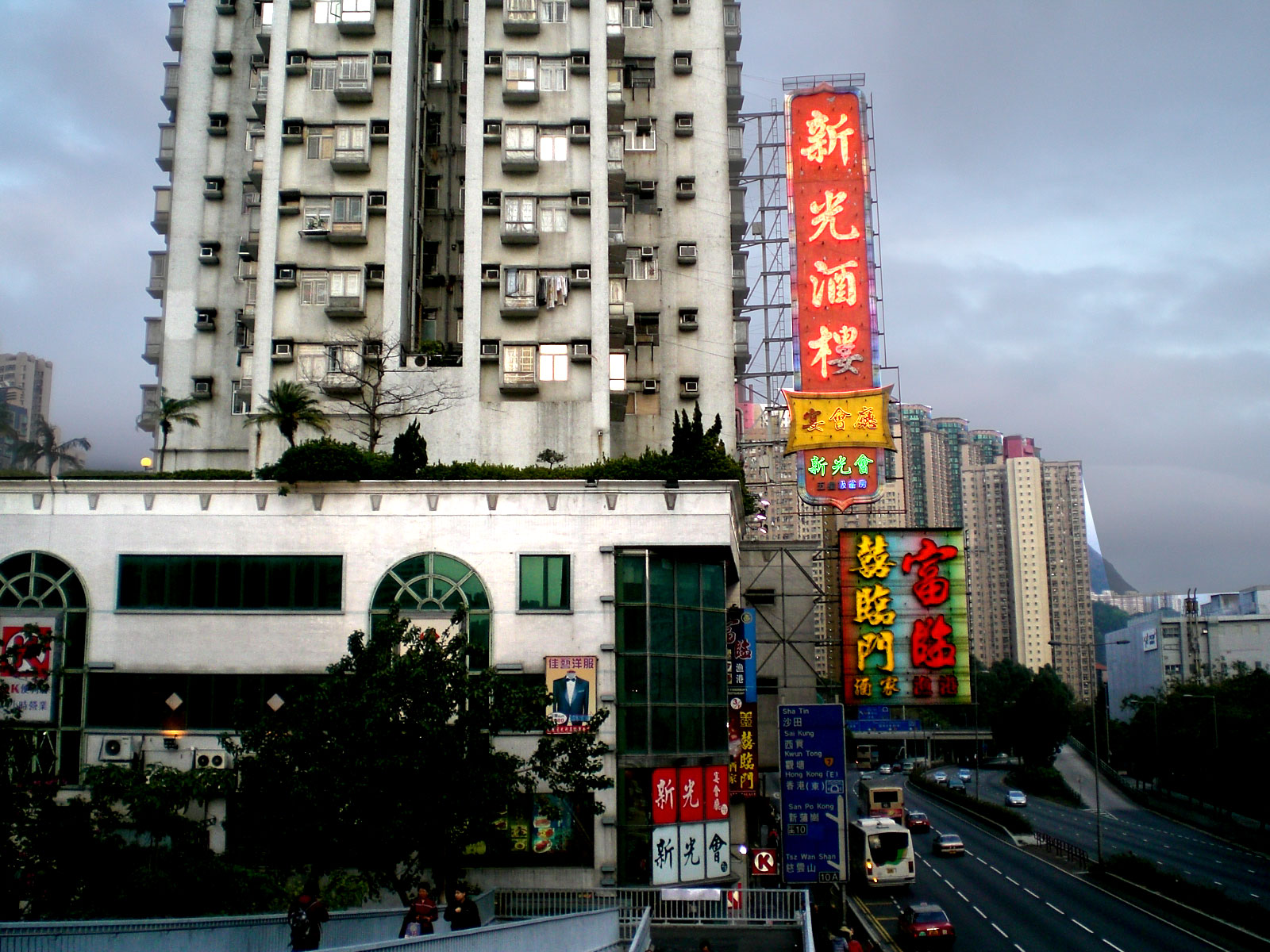 龍翔道新光中心及新光酒樓